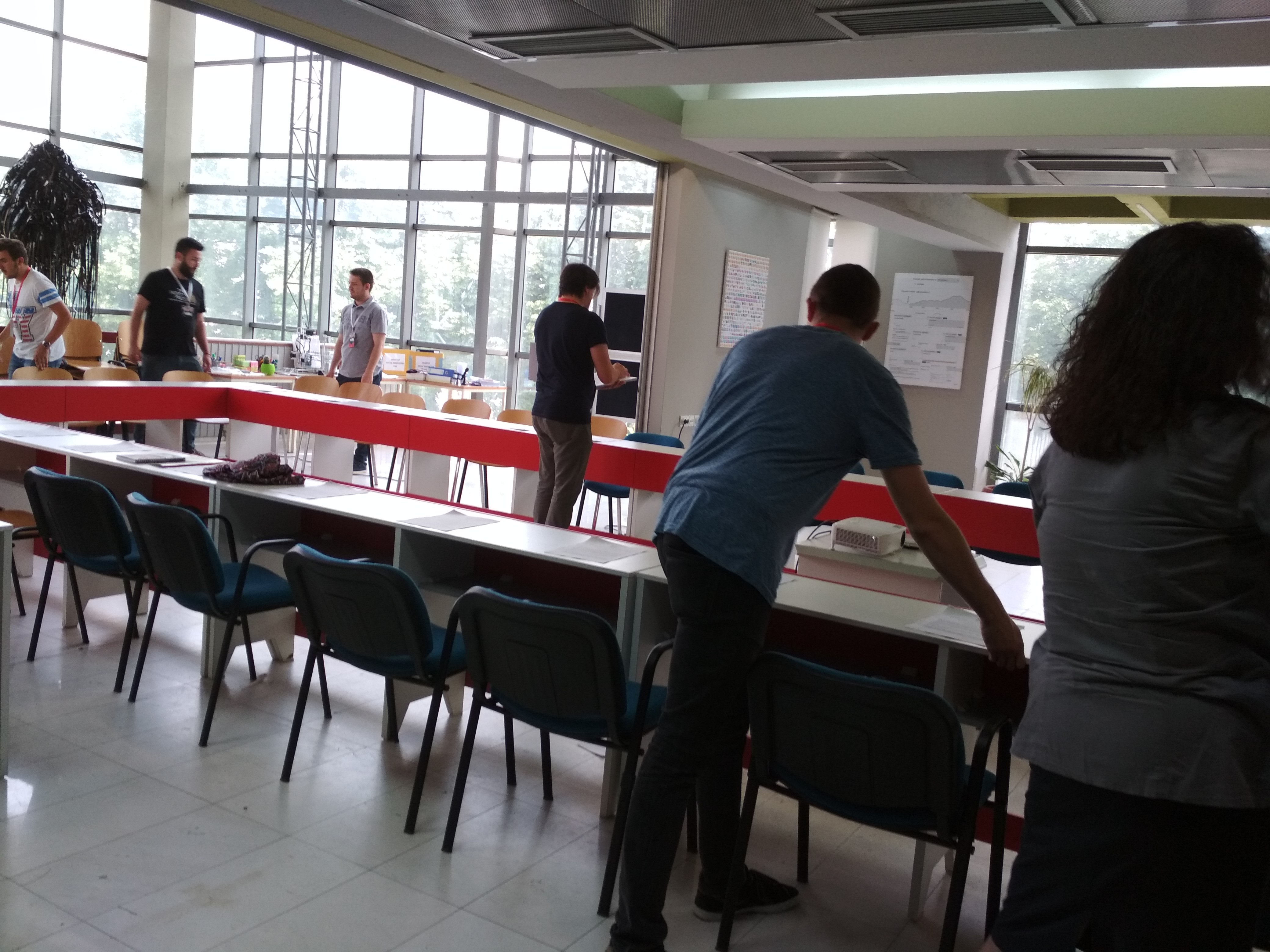 Работилница во новиот дел од Библиотеката